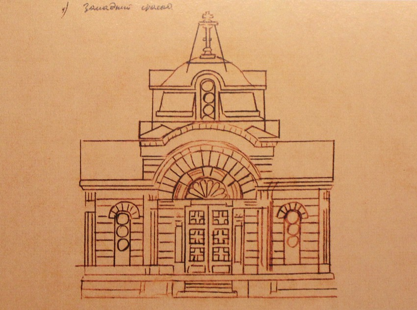 Эскиз западного фасада часовни Троицы Живоначальной (?) на подворье Раковского Свято-Троицкого женского монастыря в Самаре